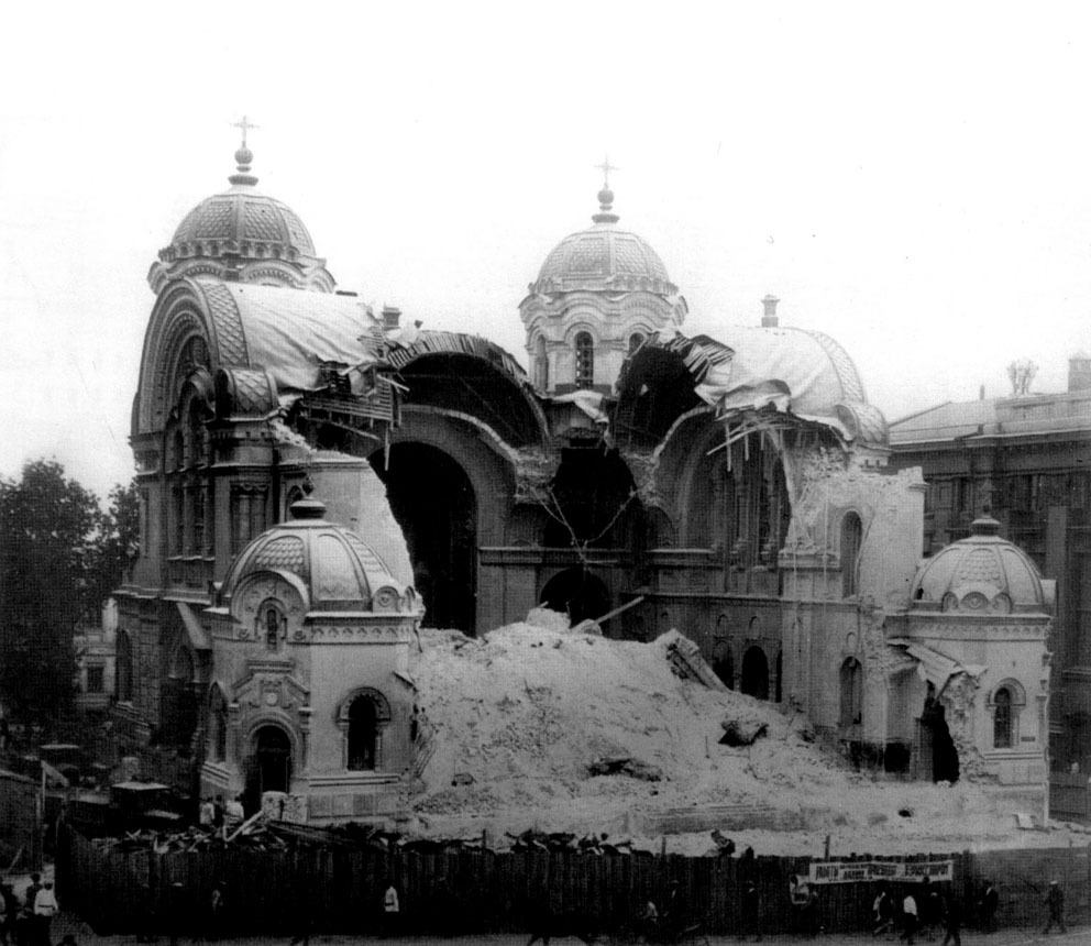 Николаевский собор (Харьков) на Николаевской площади. Разрушение. 1930 год.